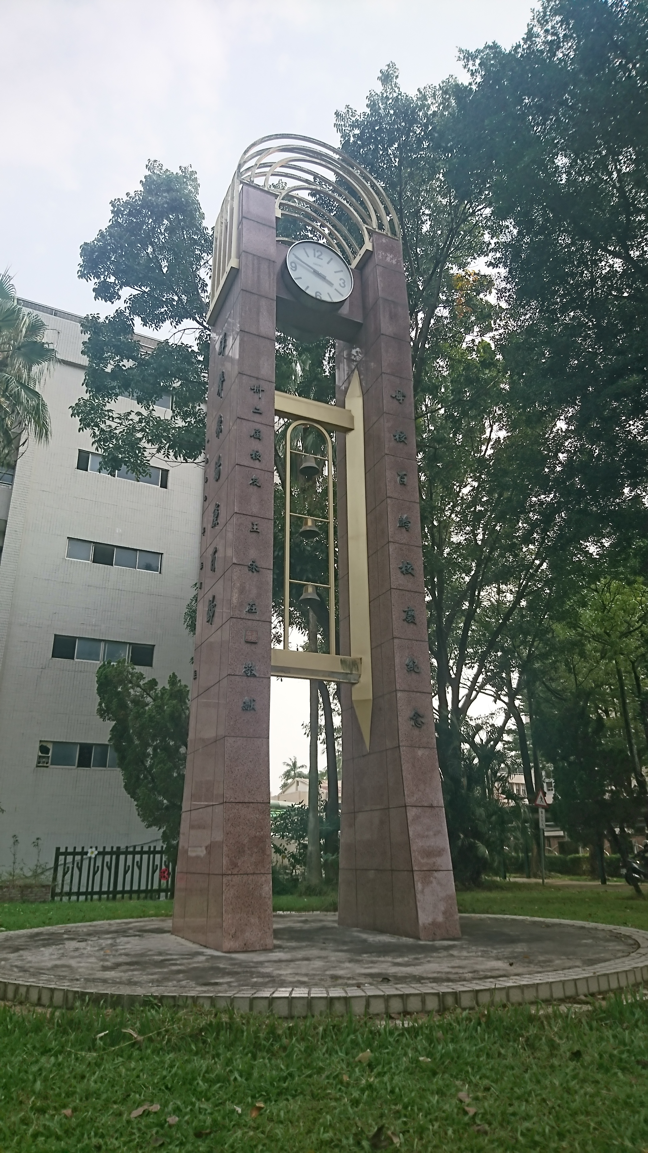 臺灣嘉義市崇文國小創校百週年紀念鐘樓，建於1999年，逢百年校慶，由1934年畢業校友王永在捐贈興建百週年塔。